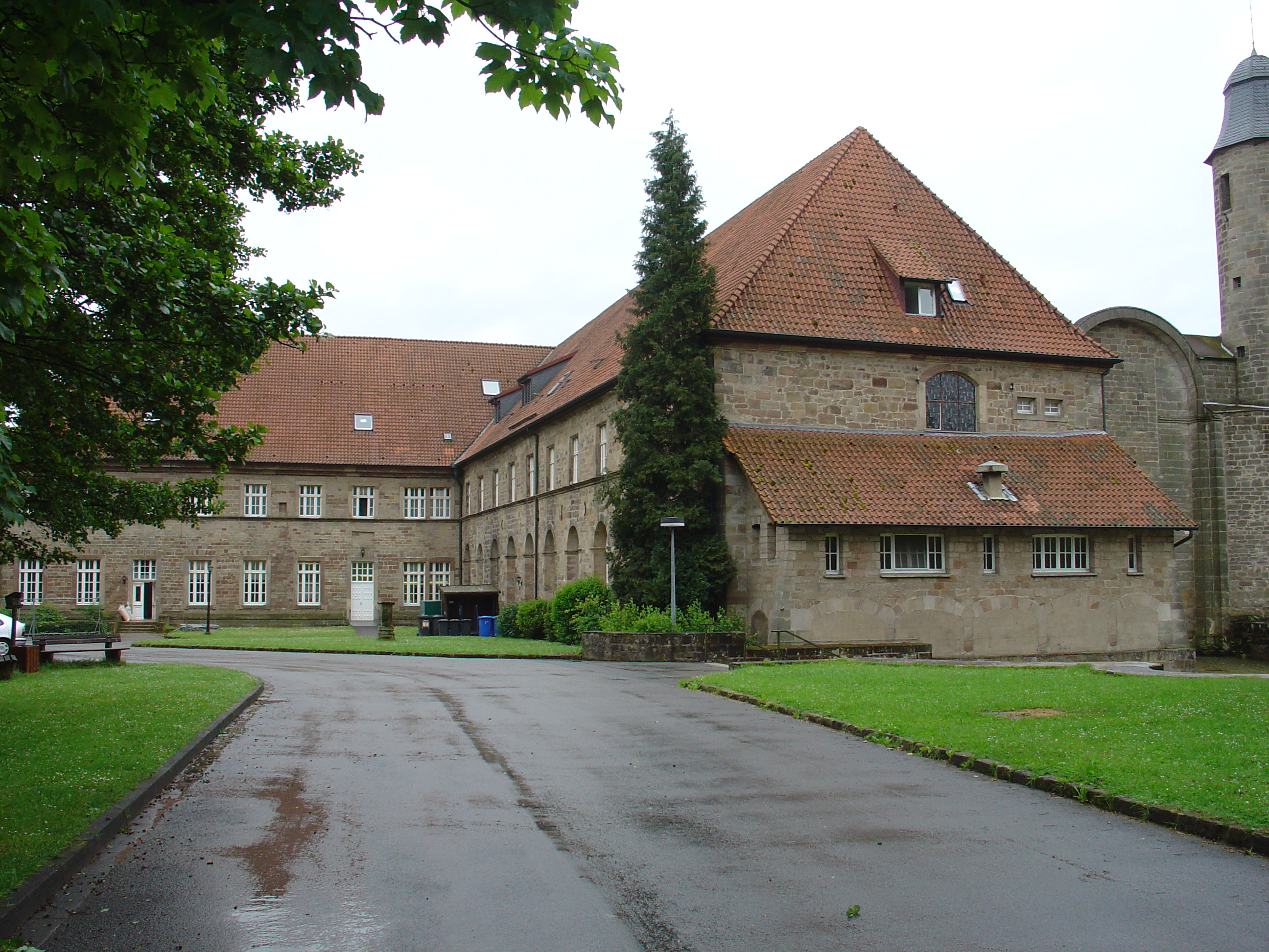 Ansicht des Klosters Hardehausen